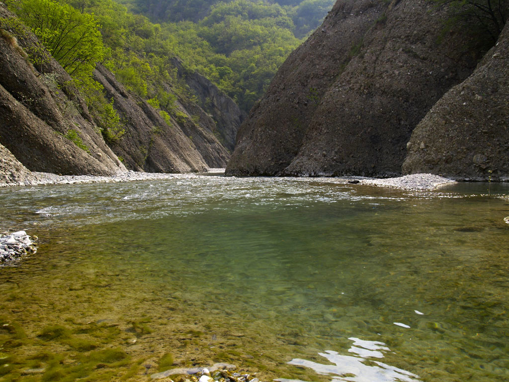 Il torrente Borbera nelle Strette di Pertuso tra Borghetto di Borbera e Cantalupo Ligure.